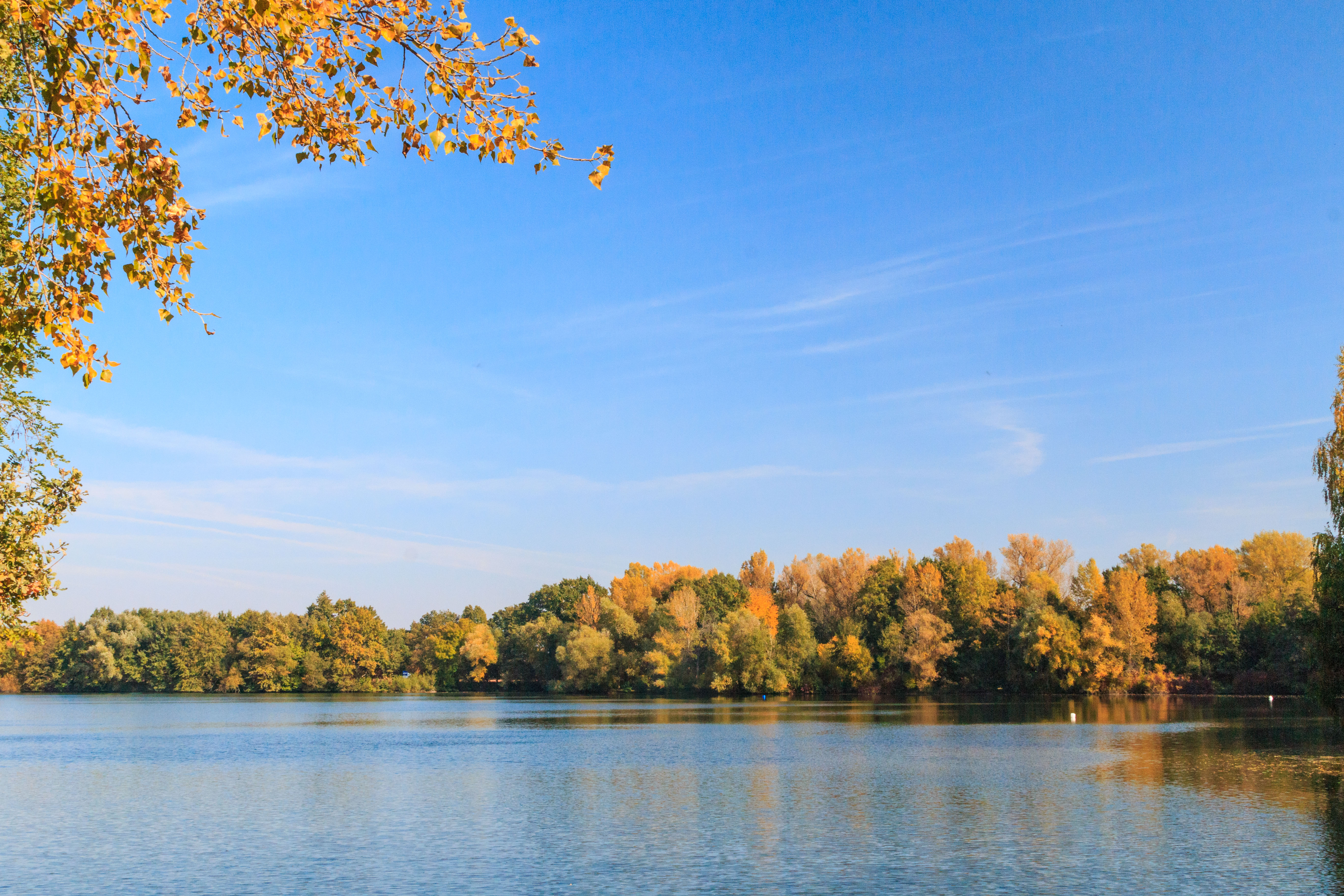 Správčický písník u Lochenic Project: Vodstvo.